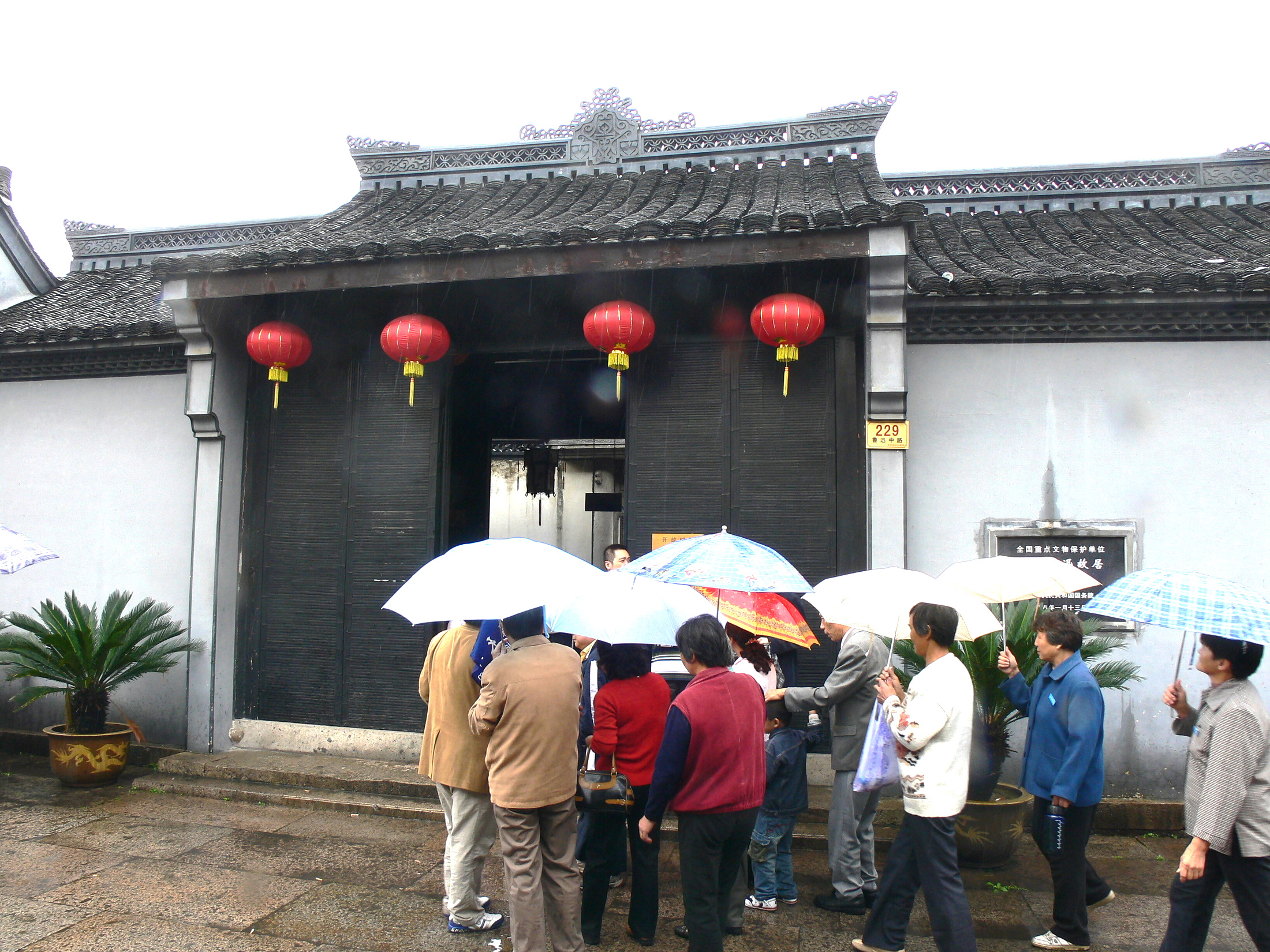 绍兴鲁迅中路229号鲁迅故居